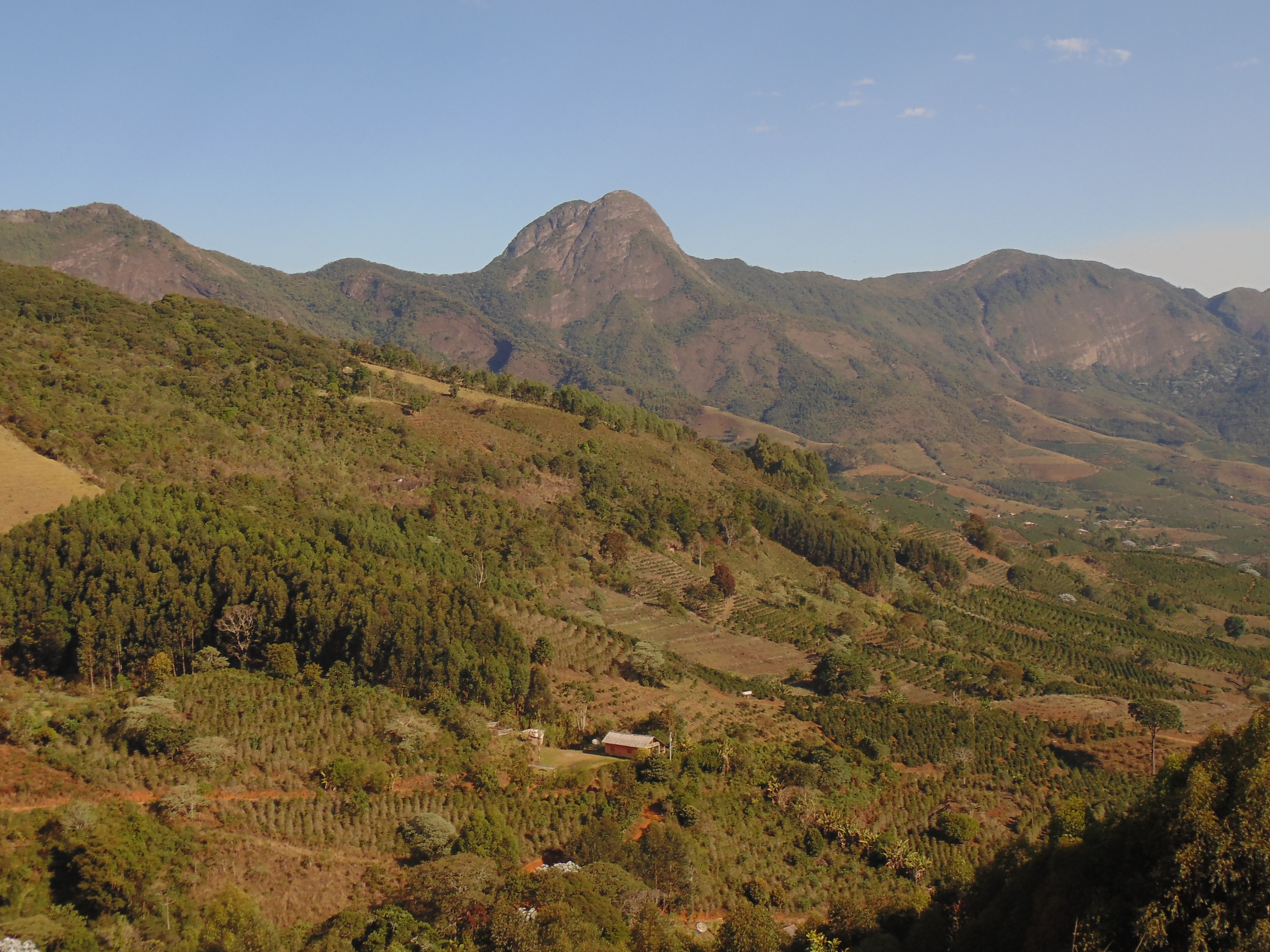 Vista de Dores do Rio Preto/ES